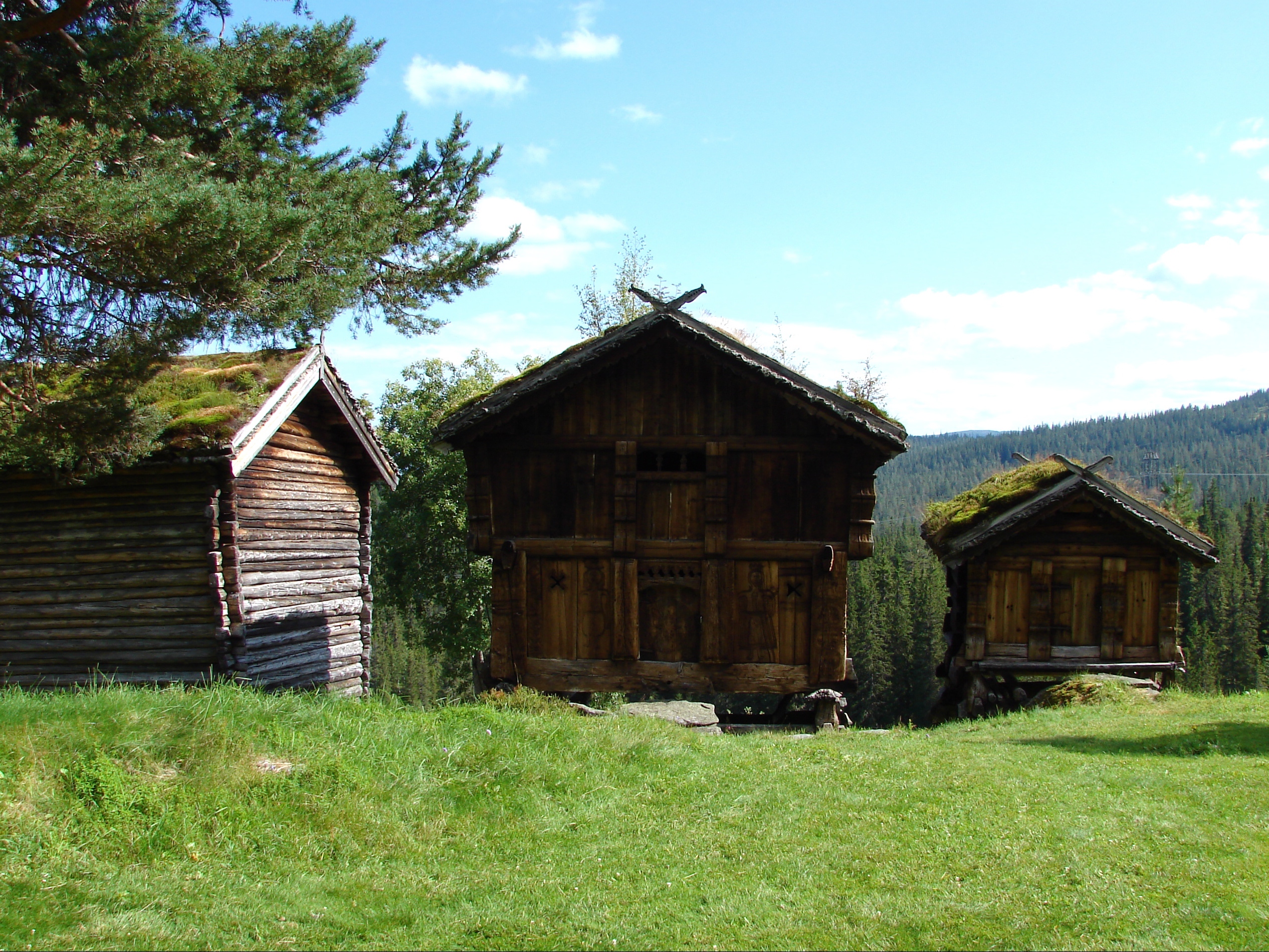 Grimdalstunet i Telemark